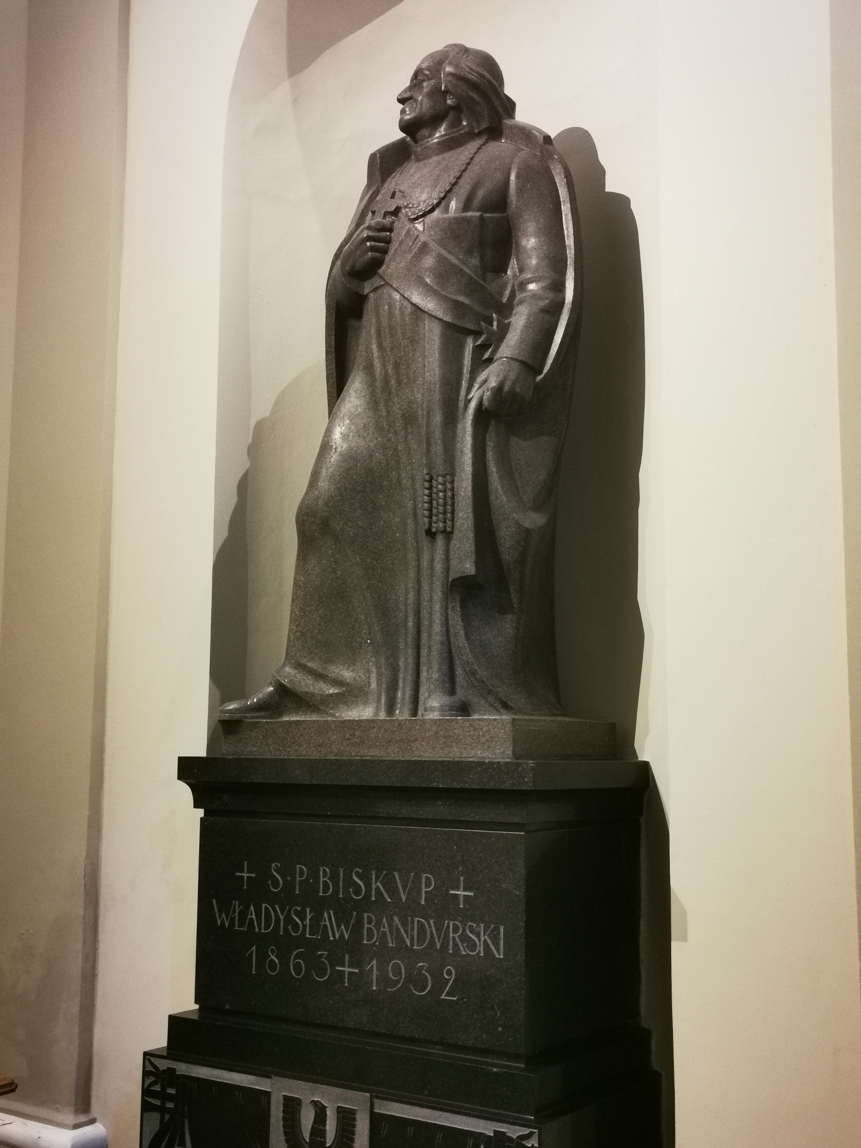 Palaimintųjų relikvijų koplyčia